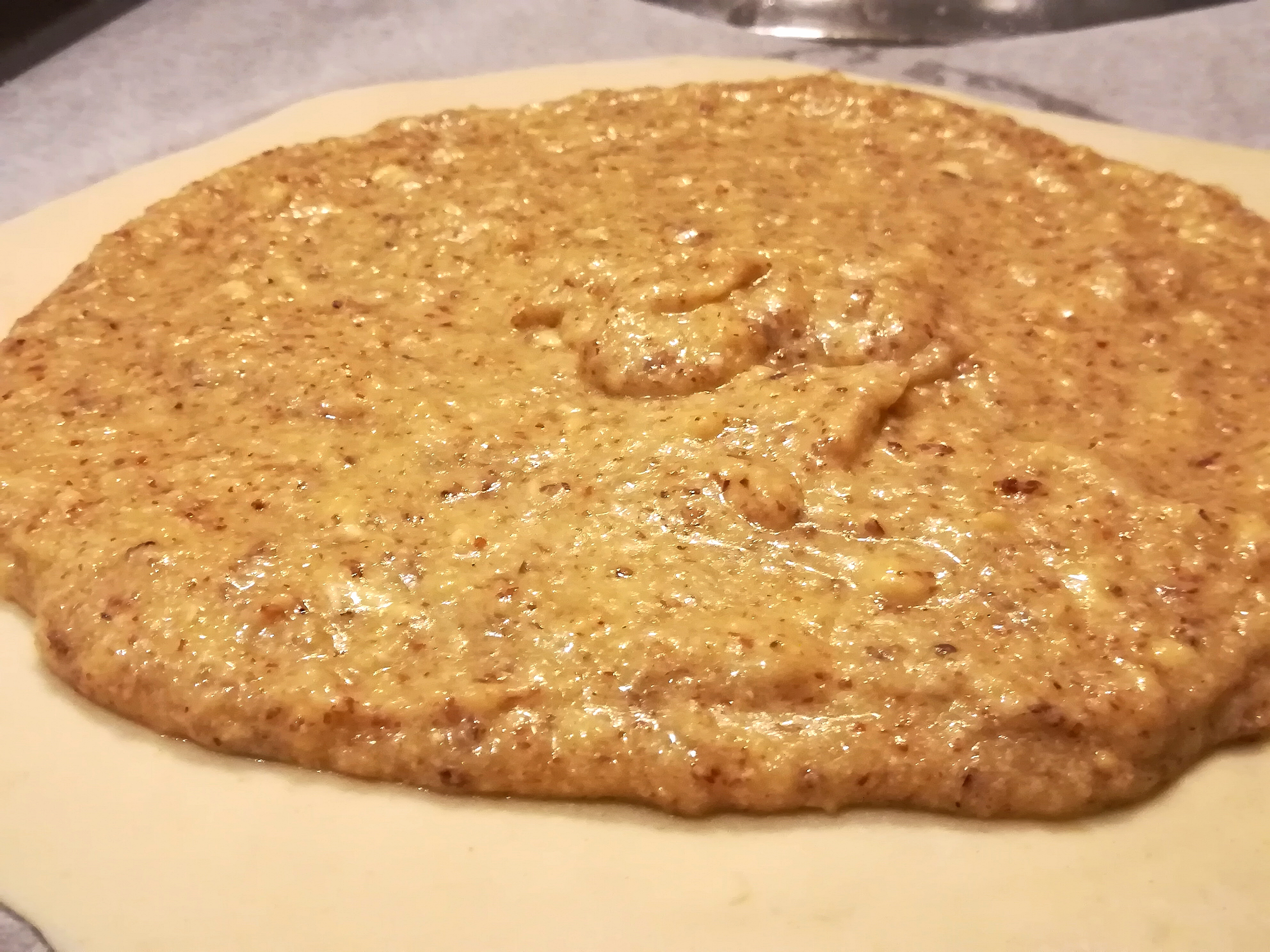 Creme frangipane- un mélange de beurre, amandes, sucre et crème pâtissière